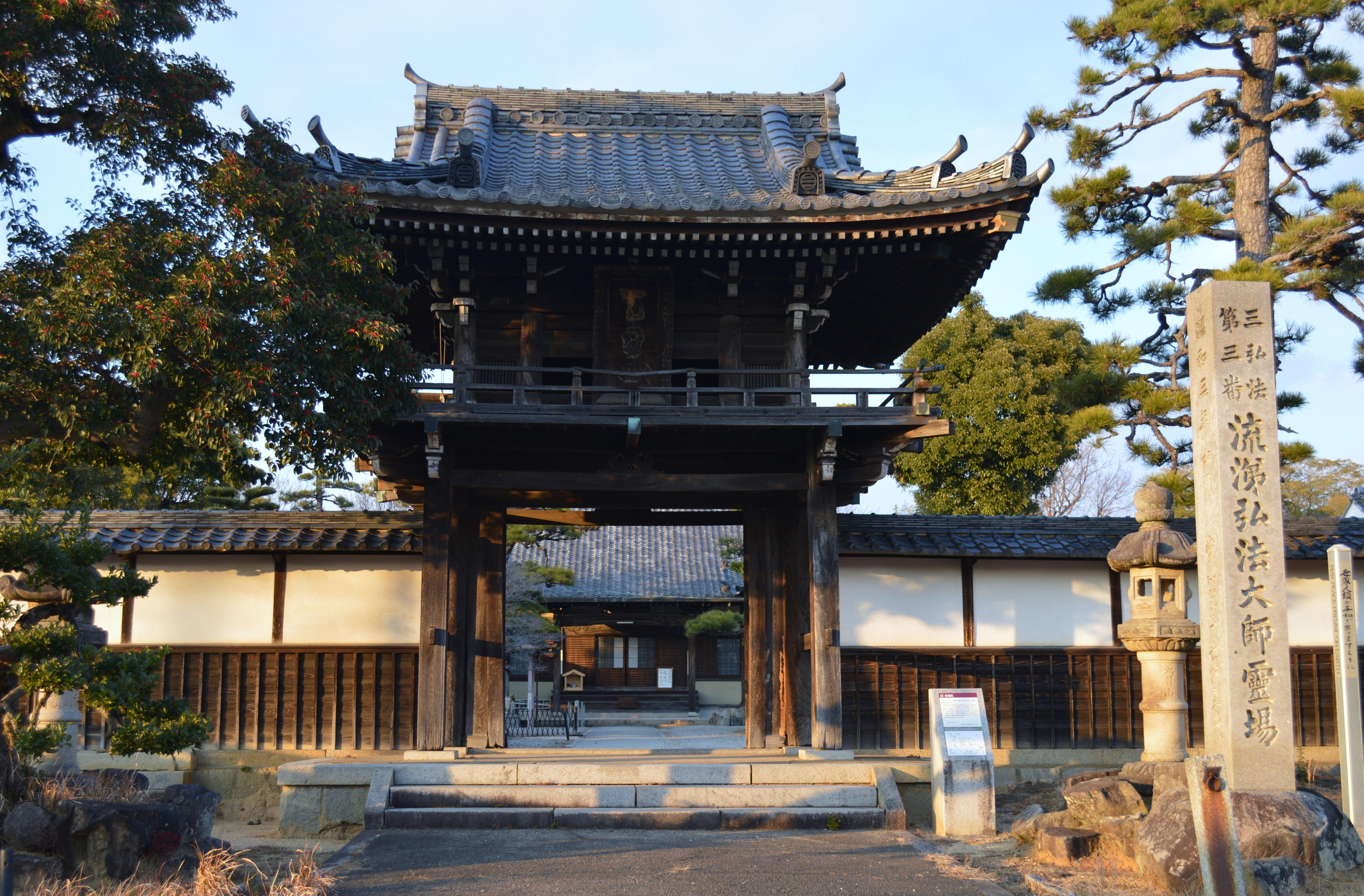 愛知県刈谷市一里山町にある寺院「密蔵院」